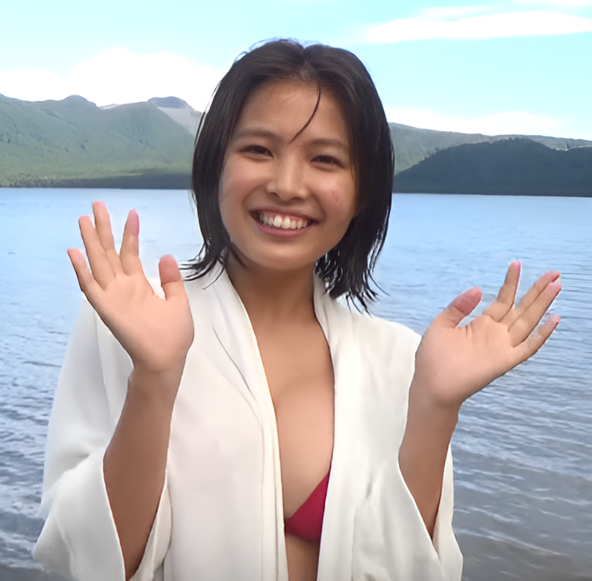 寺本莉緒です。